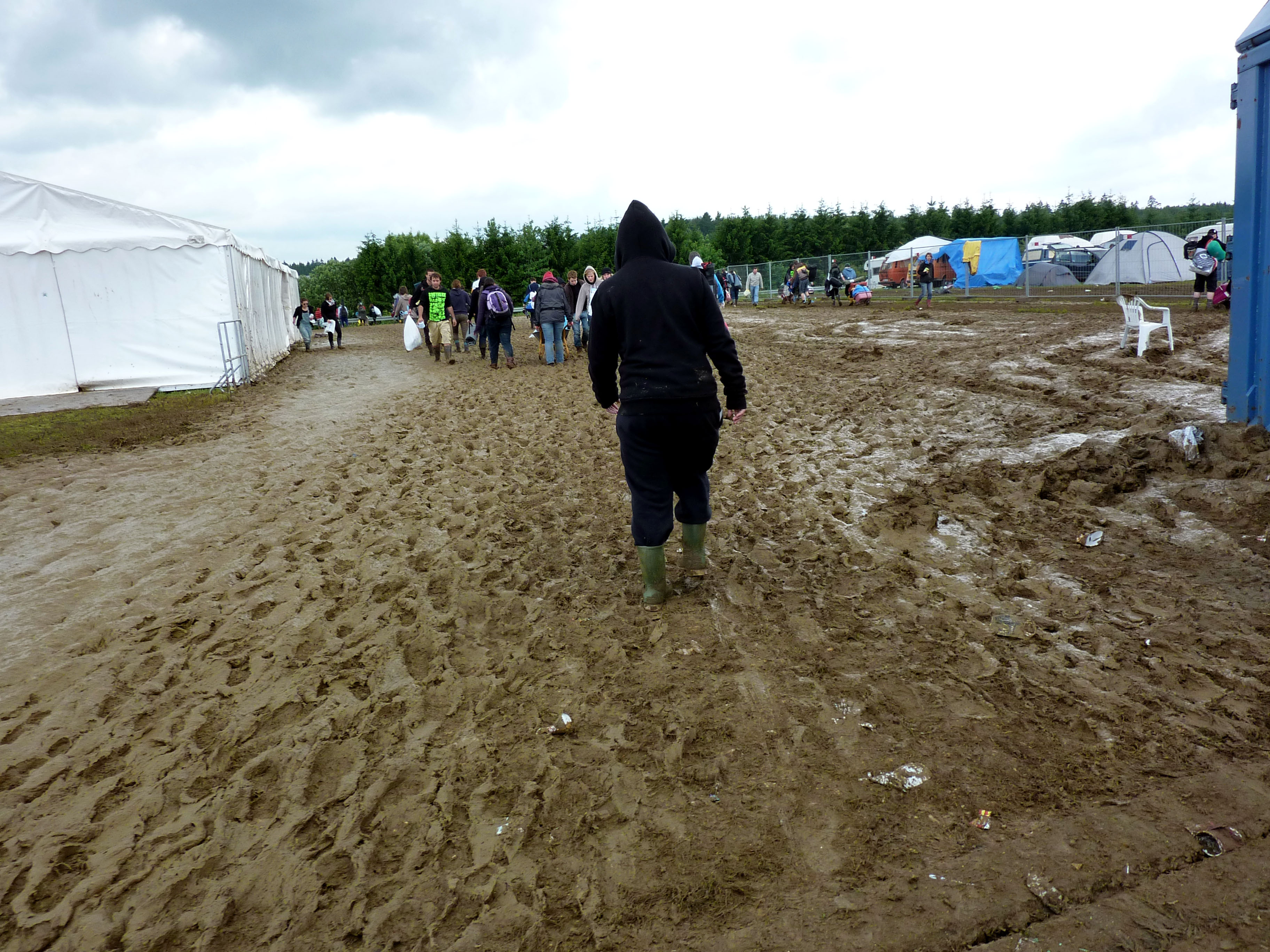 Bild des Eingangsbereichs am Samstag, 19.06.2010